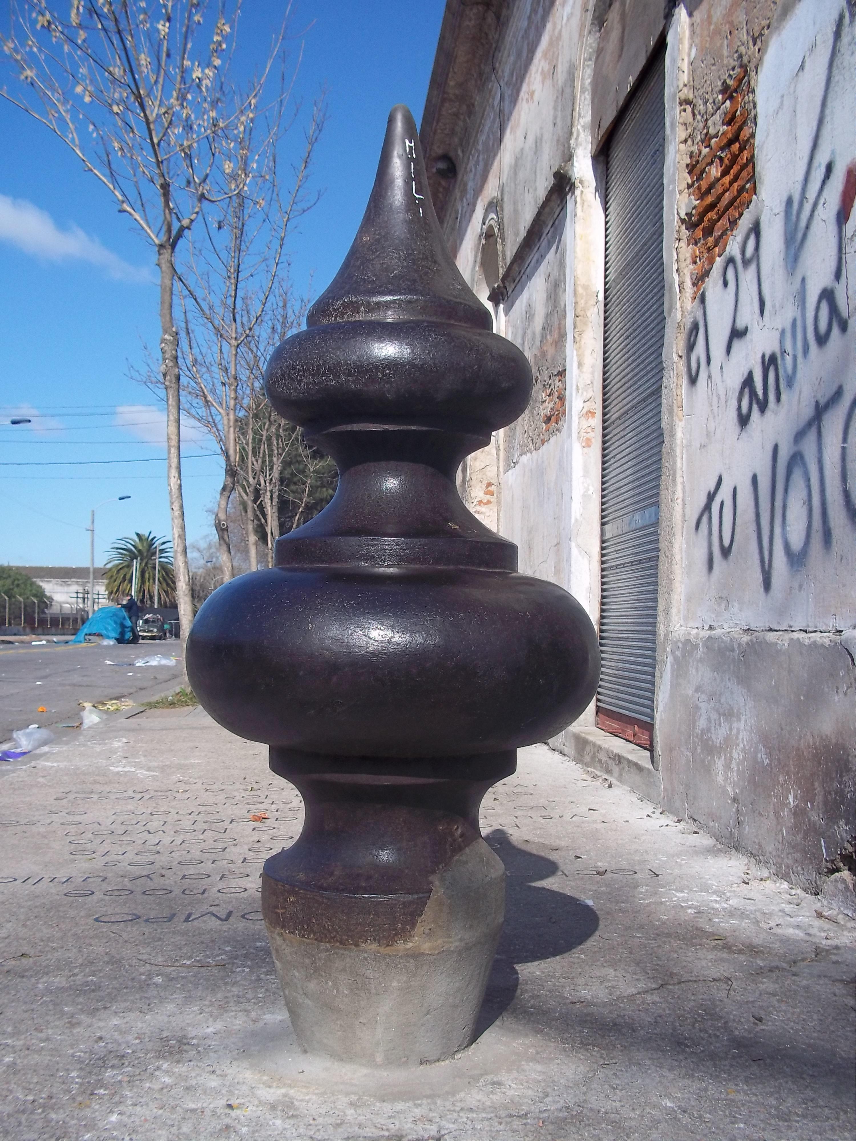 "El Trompo"; símbolo del barrio Peñarol en Montevideo, Uruguay. Ubicado en la esquina de las calles Avda. Aparicio Saravia y Newton, se desconoce su origen, cuando fue instalado, quien lo puso allí o que función cumplía. Hay muchas especulaciones entorno a él; la más popular dice que era un cañón de la época de la colonización española (1765 - 1790).